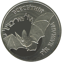 Всесвітній рік кажана реверс